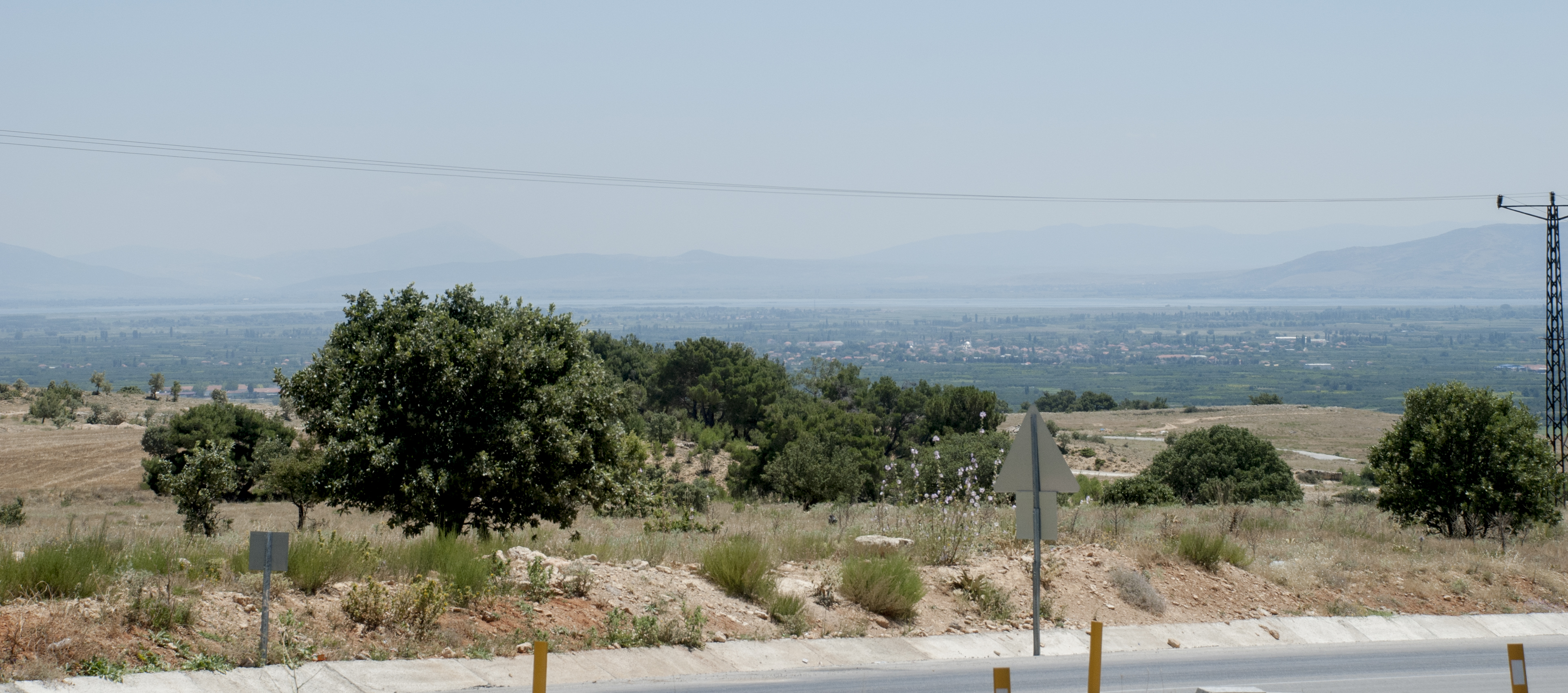 Denizli, Çivril ovası ve Işıklı Gölü